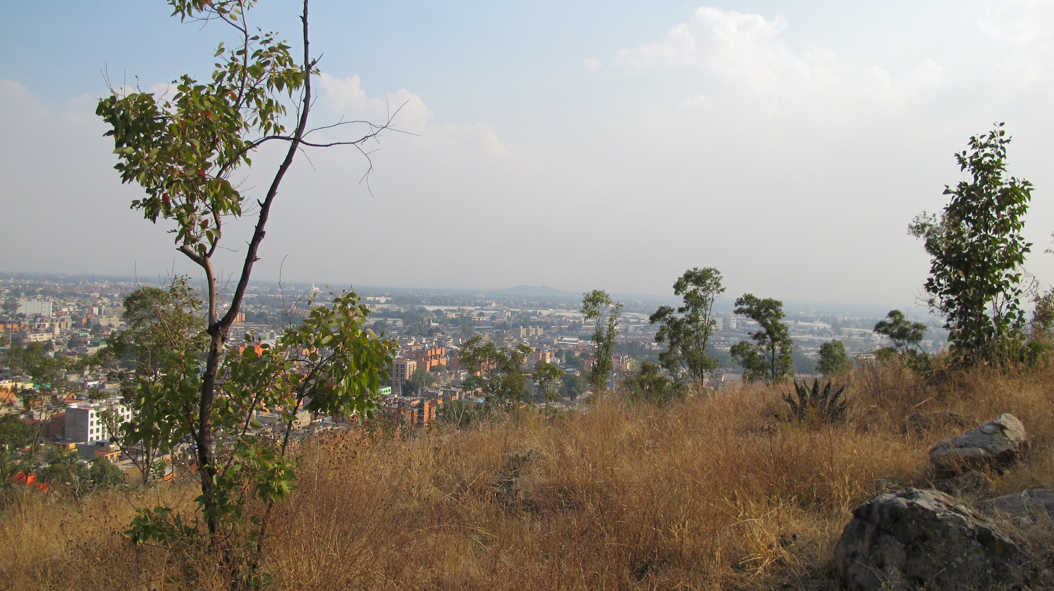 Vegetación en Cerro del Guerrero, Parque Nacional del Tepeyac